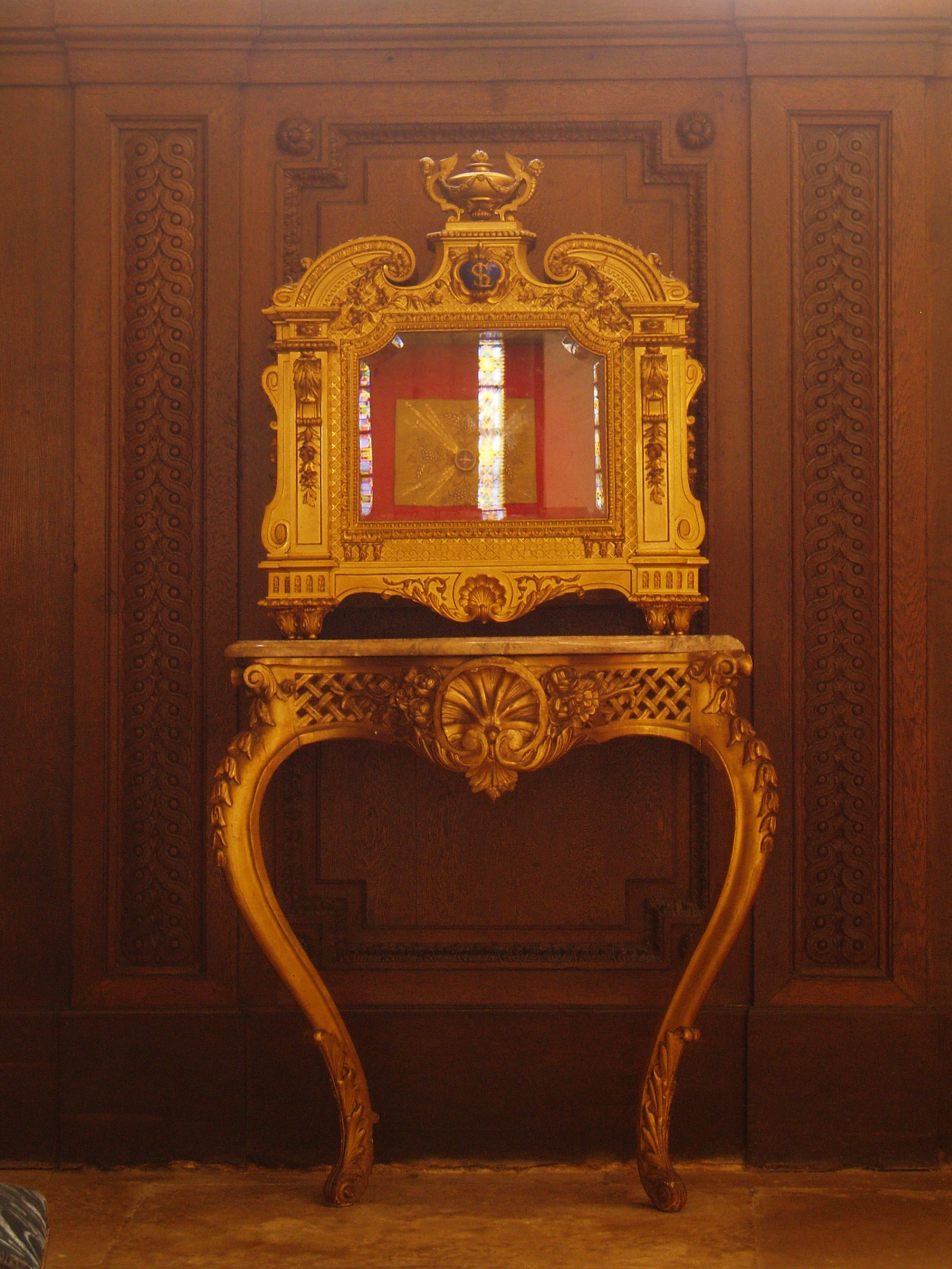 Reliquaire de Saint Louis Cathédrale Saint Louis de Versailles Architecte : Jules Hardouin Masart de Sagonne Construction : 12 juin 1743 Inauguration : 24 août 1754 consacrée cathédrale en 1843